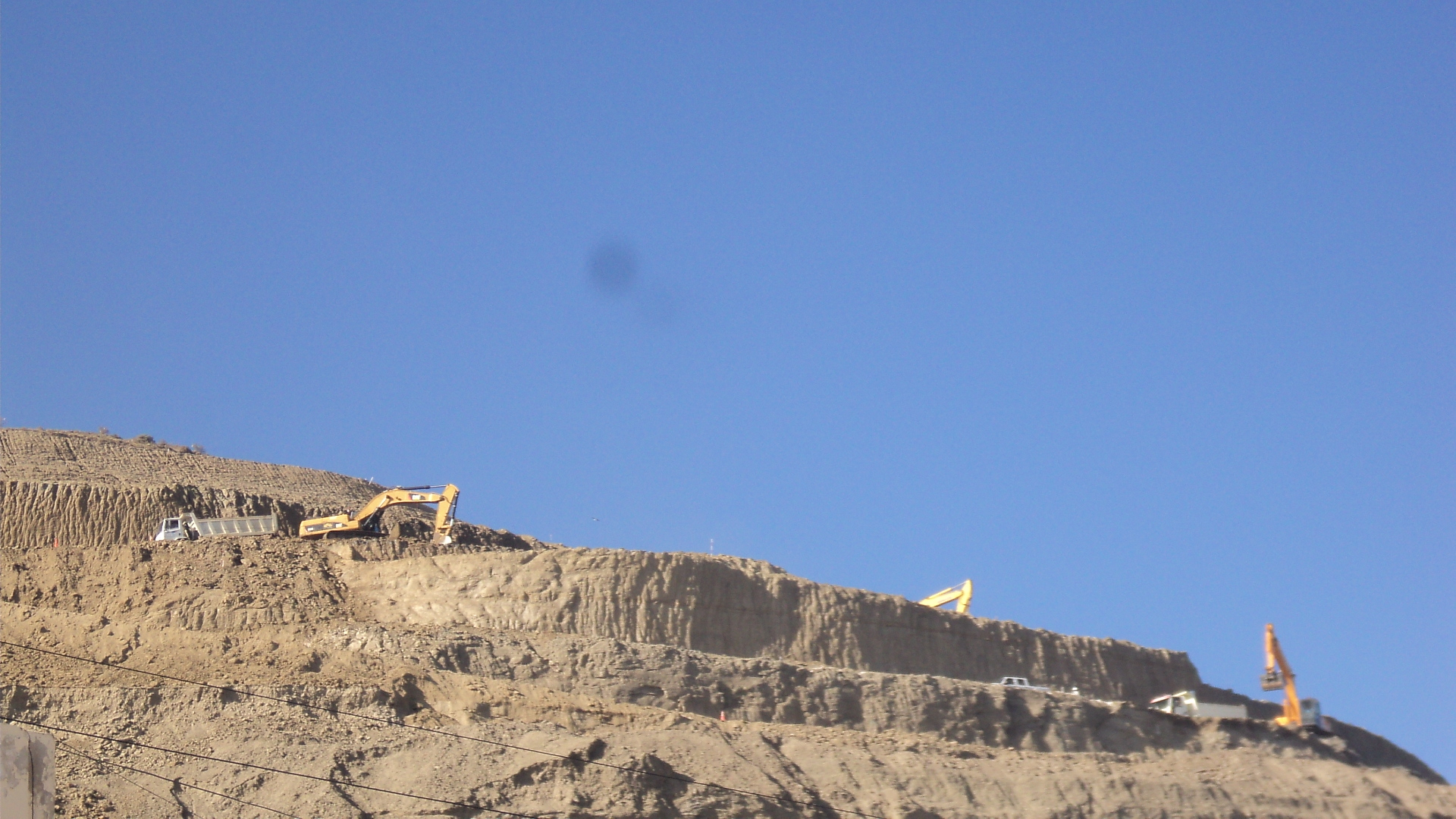 Aterrazamiento en la ladera queda al microcentro, en forma de escalera su trabajo